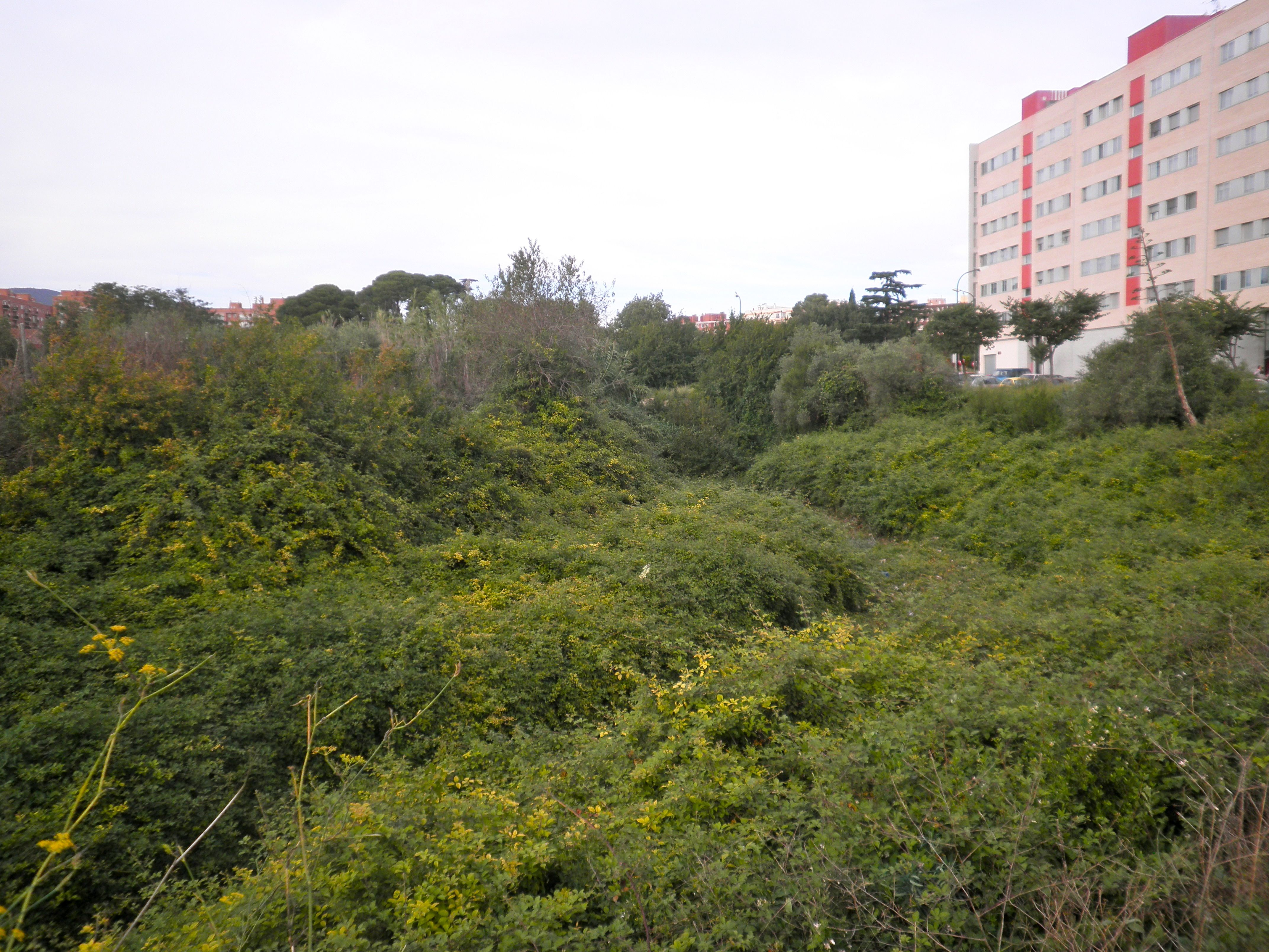 El Barranc de la Buada o del Molí, abans d'ajuntar-se amb el del Mas del Gassot, a Reus